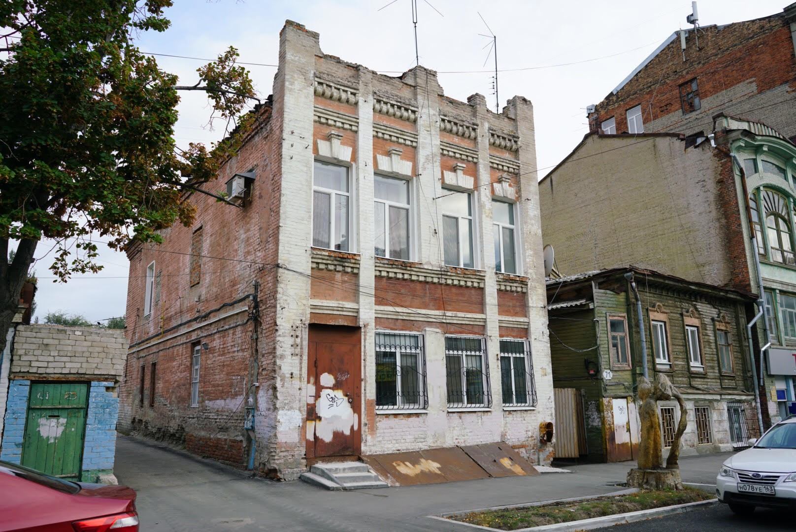 Памятник архитектурного наследия конца ХIХ в.